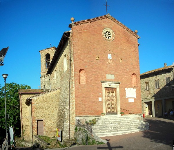 church of S. Maria Assunta, Casalalta, Deruta, Perugia, Umbria, Italy